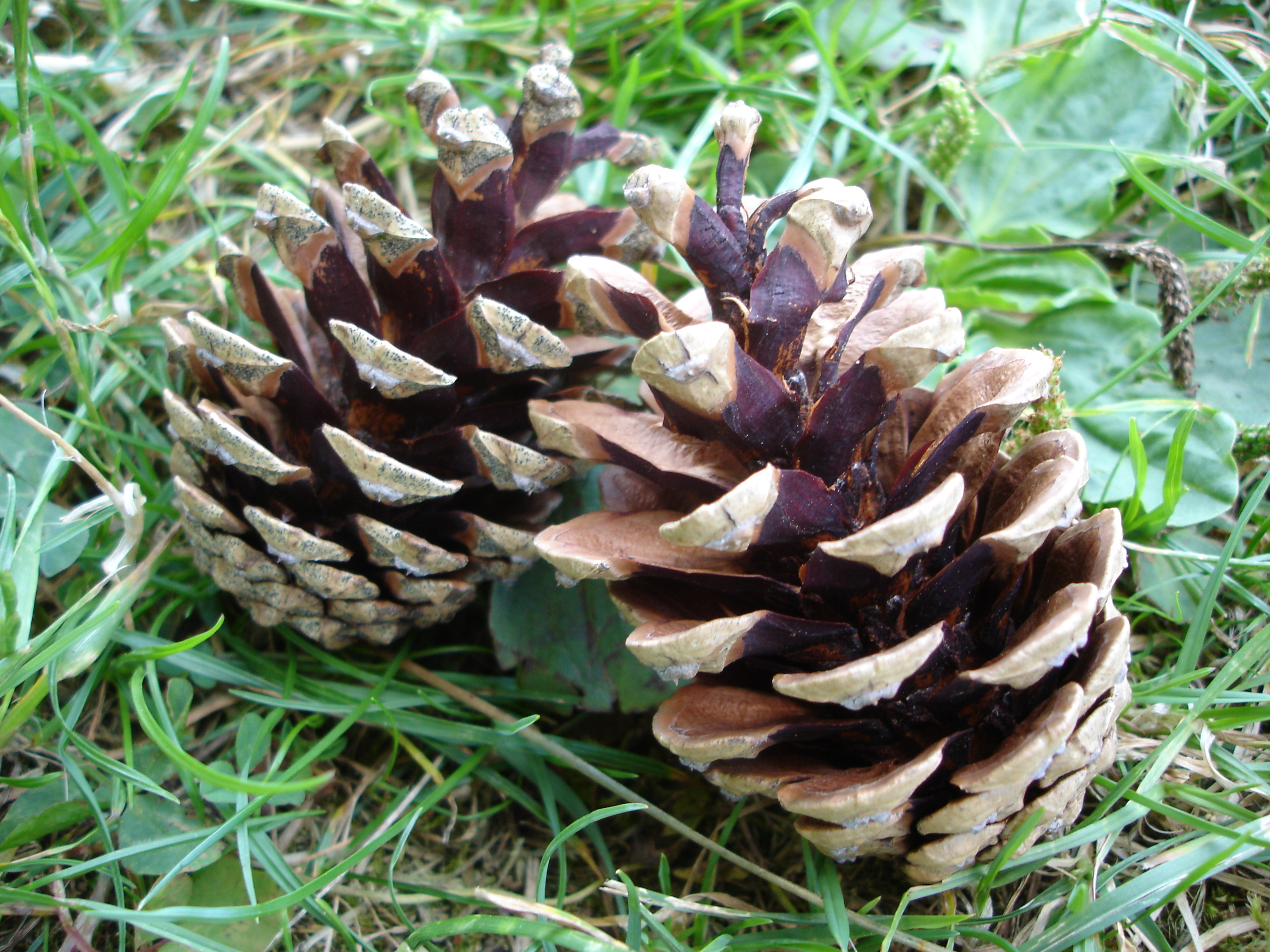 Pinus nigra Kiefernzapfen, Nahaufnahme